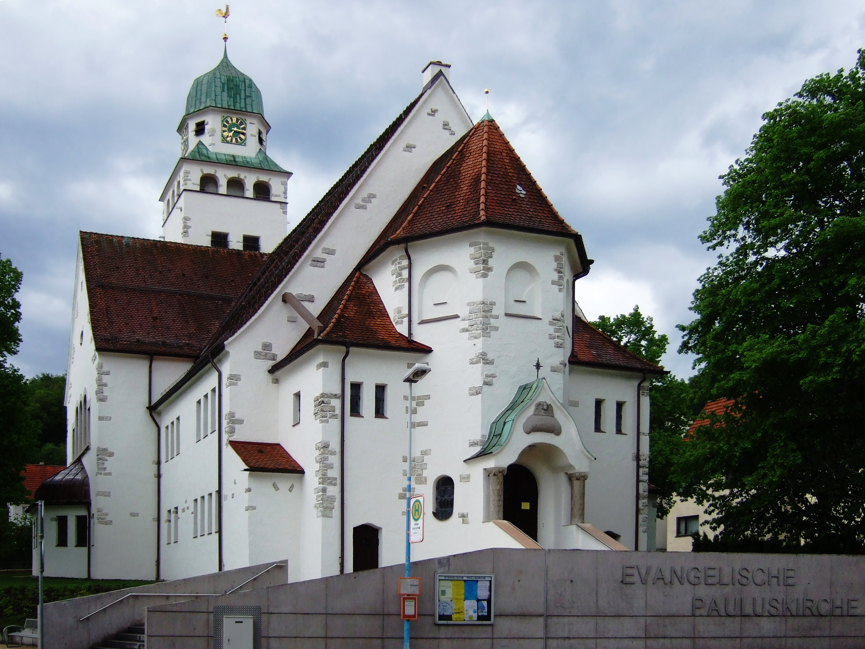 Paulus-Kirche in Tailfingen